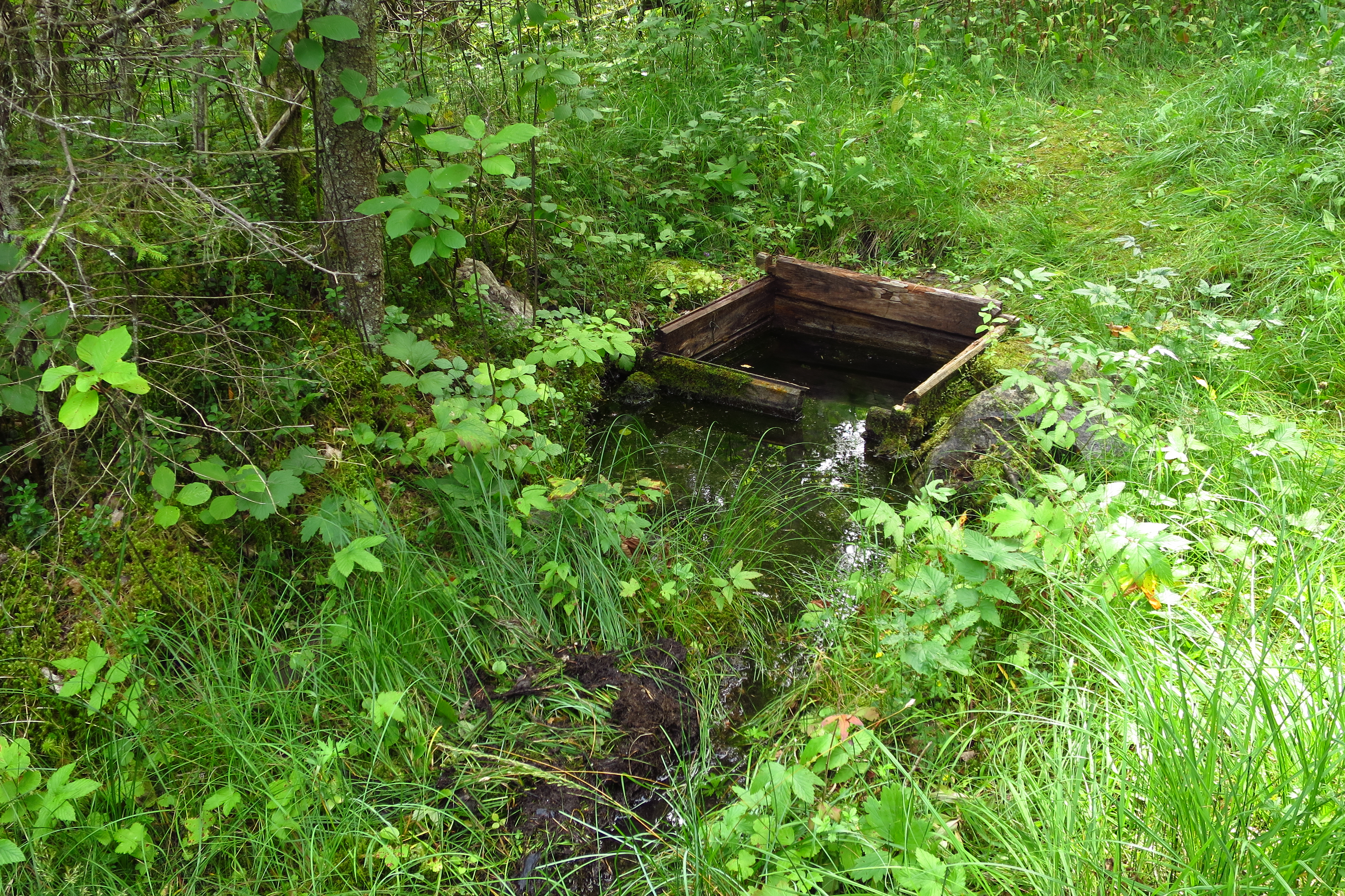 Palade Silmaallikas Kukka looduskaitsealal